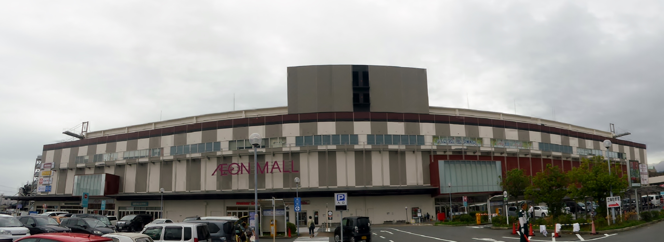 イオンモール京都五条を撮影。 Panasonic Lumix DMC-TZ60